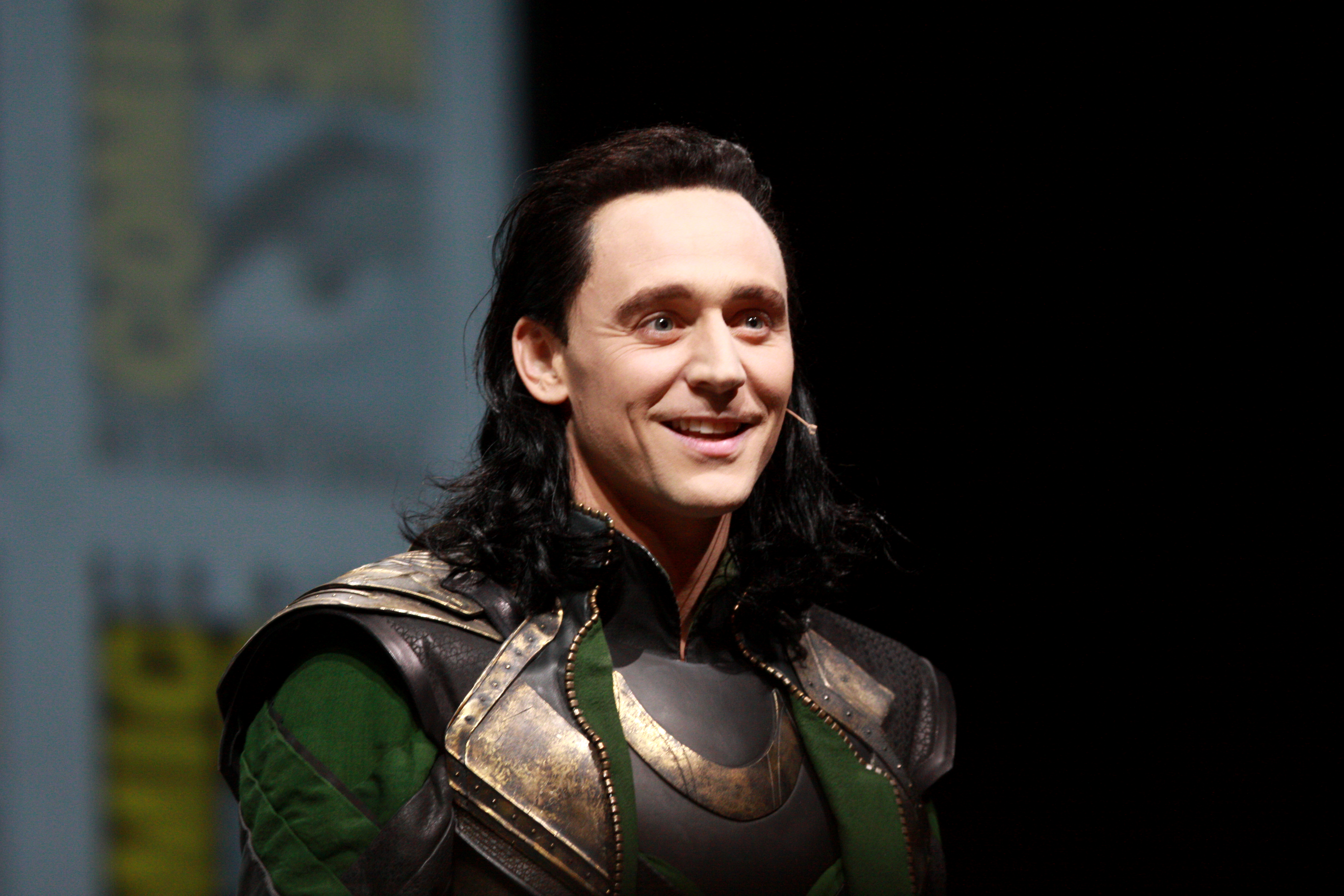 Том Хиддлстон в костюме Локи